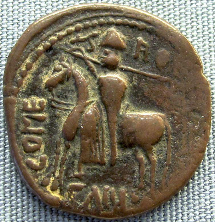 Calabria, trifollaro di ruggieri I d'altavilla, 1072-1101